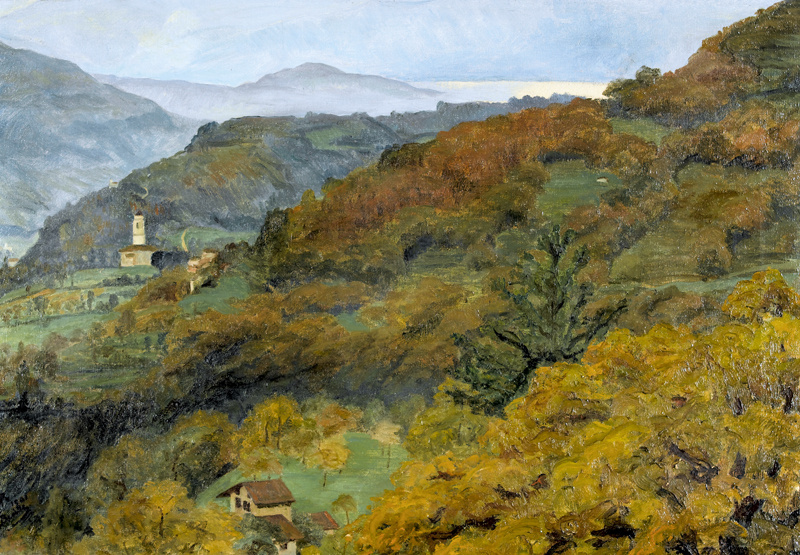 Herbstliche Tessiner Landschaft bei Beride. Öl auf Leinwand, monogrammiert, datiert 1901, bezeichnet "Beride", 44 x 63 cm